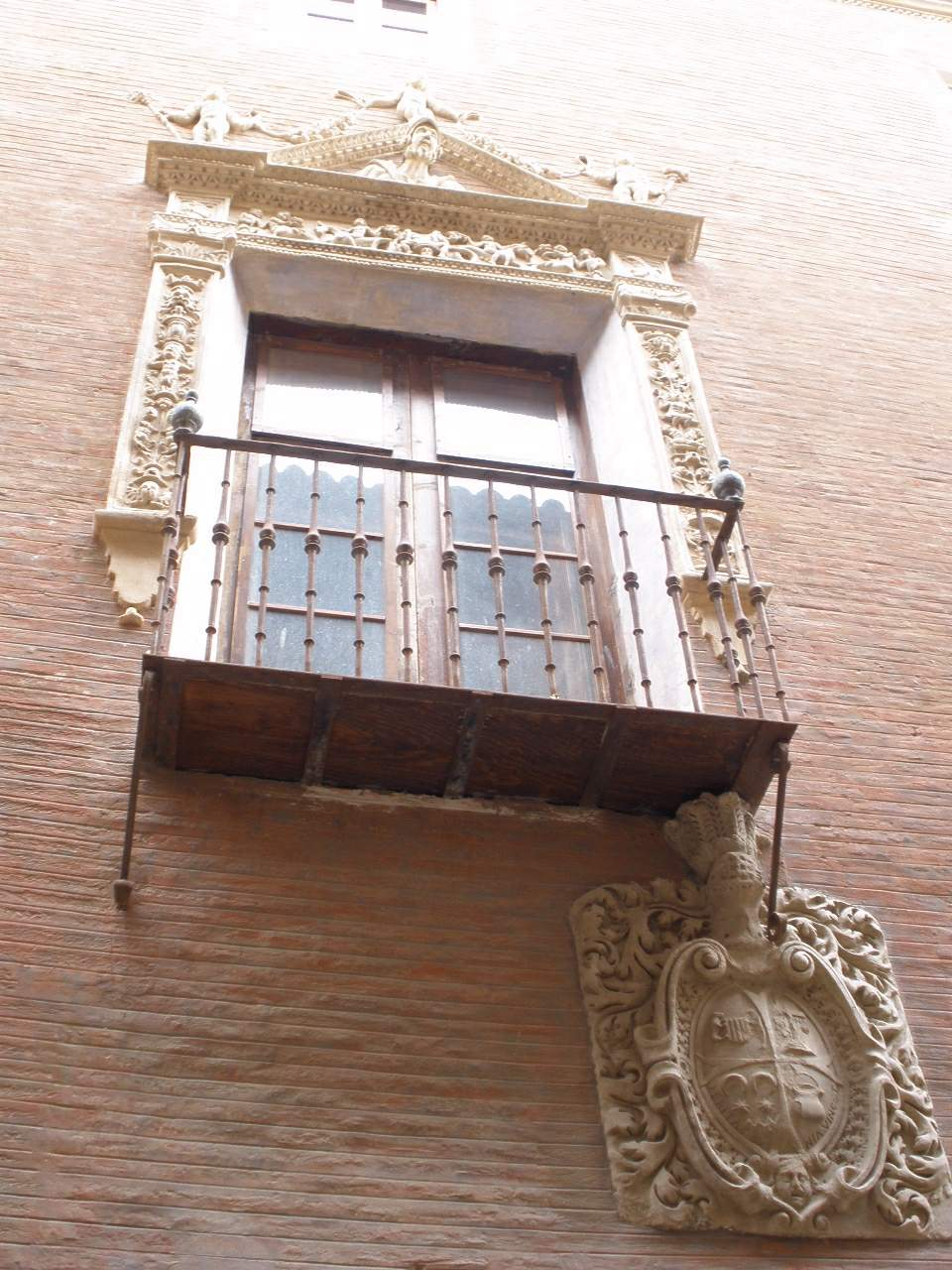 Tudela - Casa de los Ibáñez de Luna